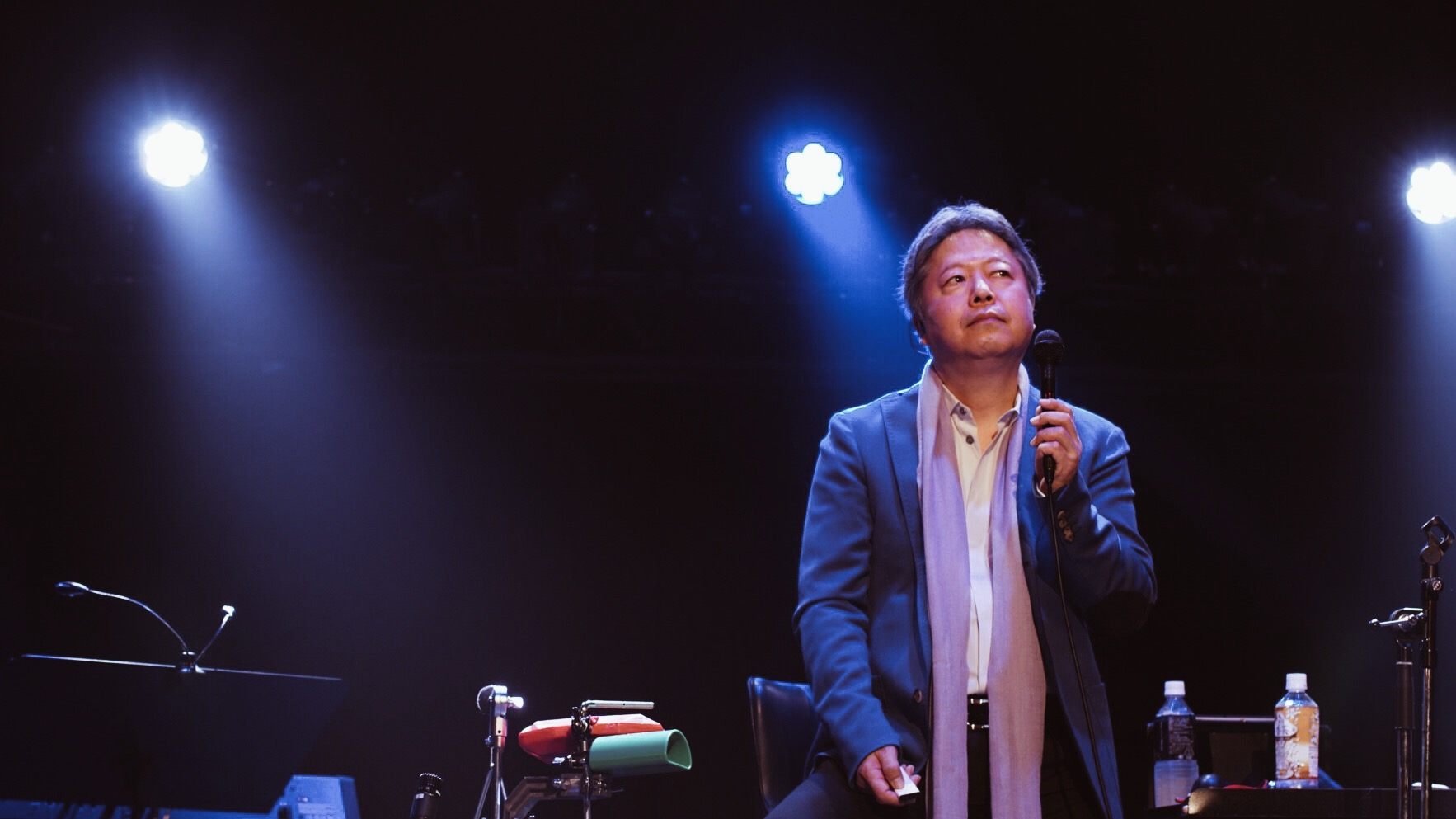 崔文駮拍摄于2016年武川行秀与大阪的演唱会